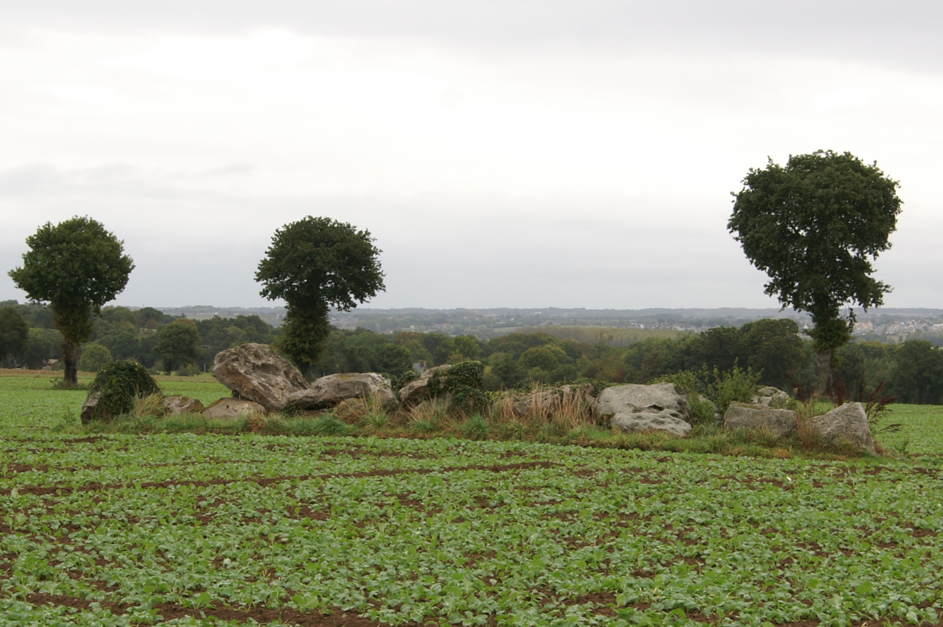 Allée couverte de la Hautière à Trégon.